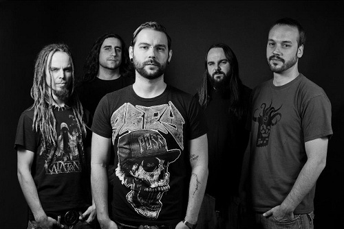 Coilbox